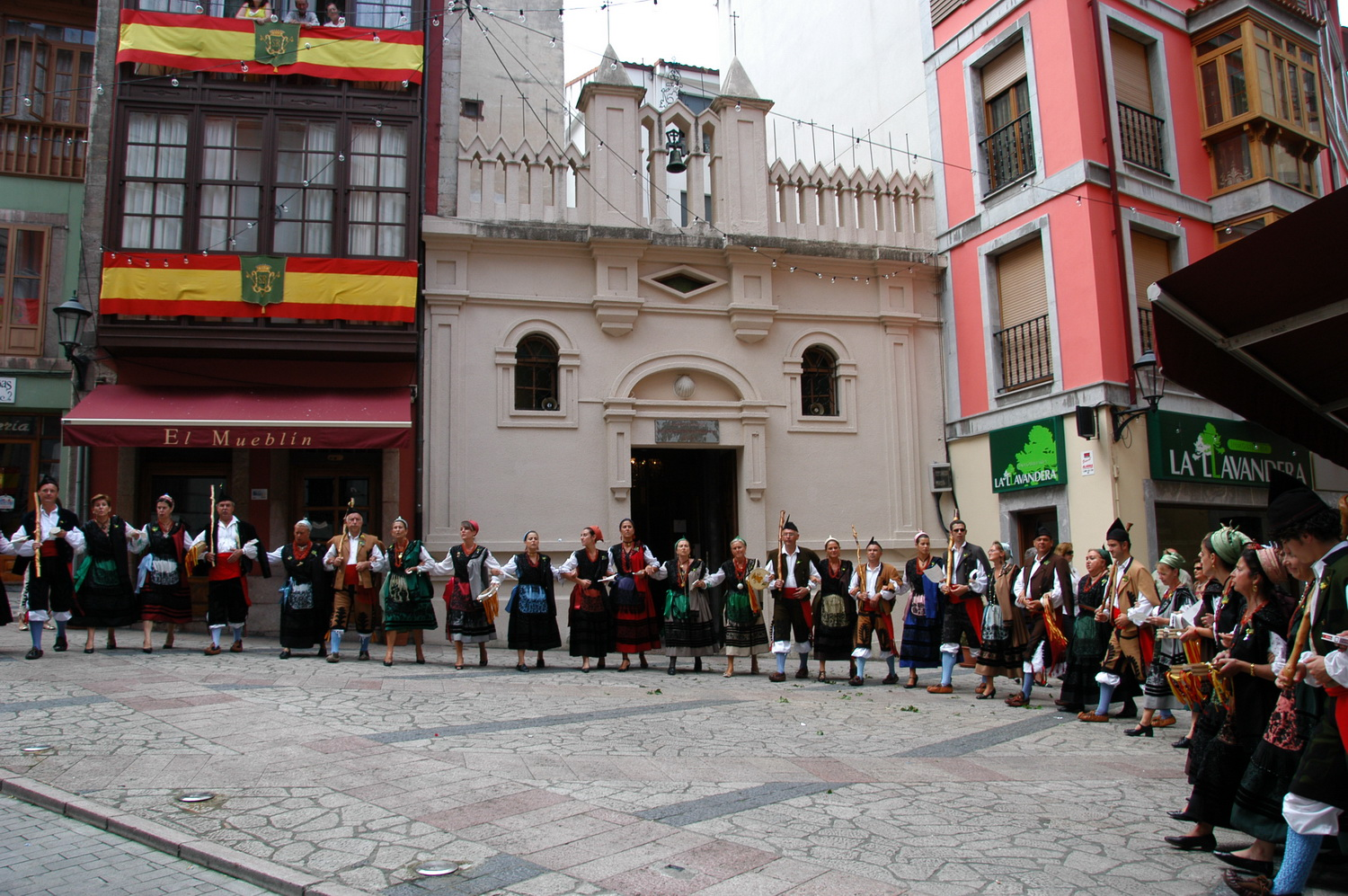 La Danza Prima es una de las mas espectaculares del día de San Roque en Llanes